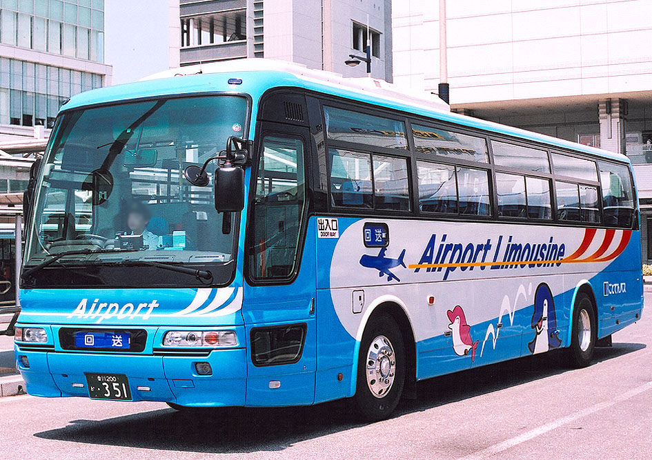 ことでんバス 高松空港リムジンバス 三菱ふそう・エアロバス エアポートライナー PJ-MS86JP